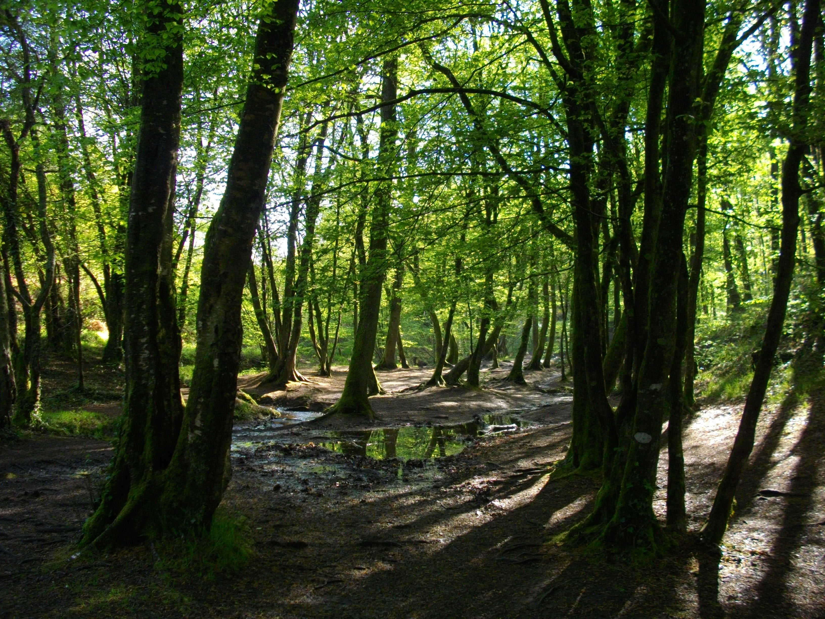 Intérieur du Val sans Retour (entre les deux étangs)